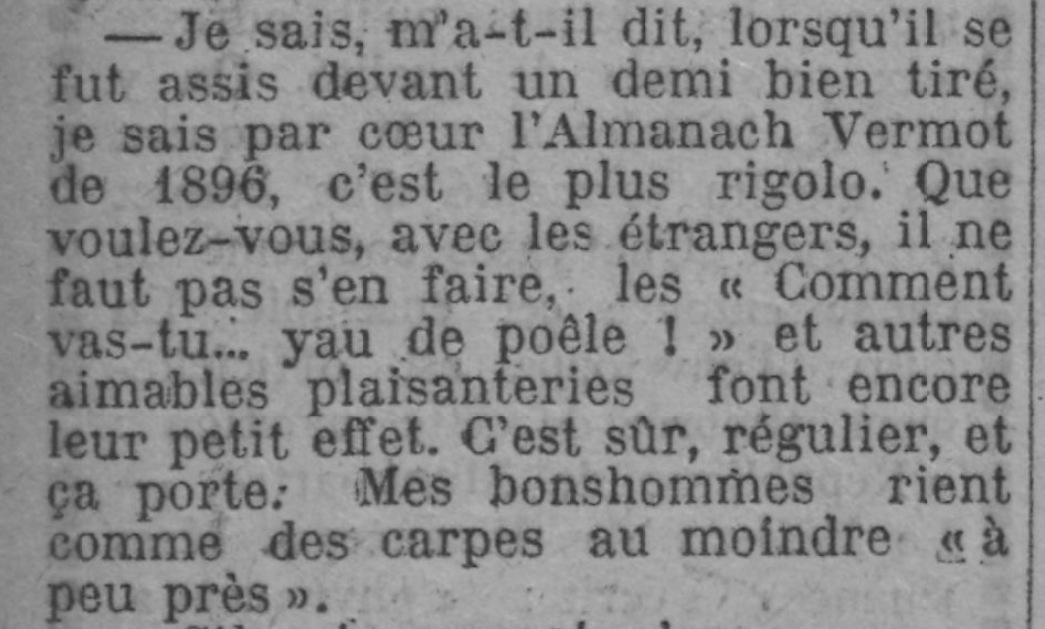 Citation de la célèbre blague "Comment vas-tu... yau de poêle !" parue dans l'Almanach Vermot de 1896, dans le Paris-Soir du 6 novembre 1925 (page 2)